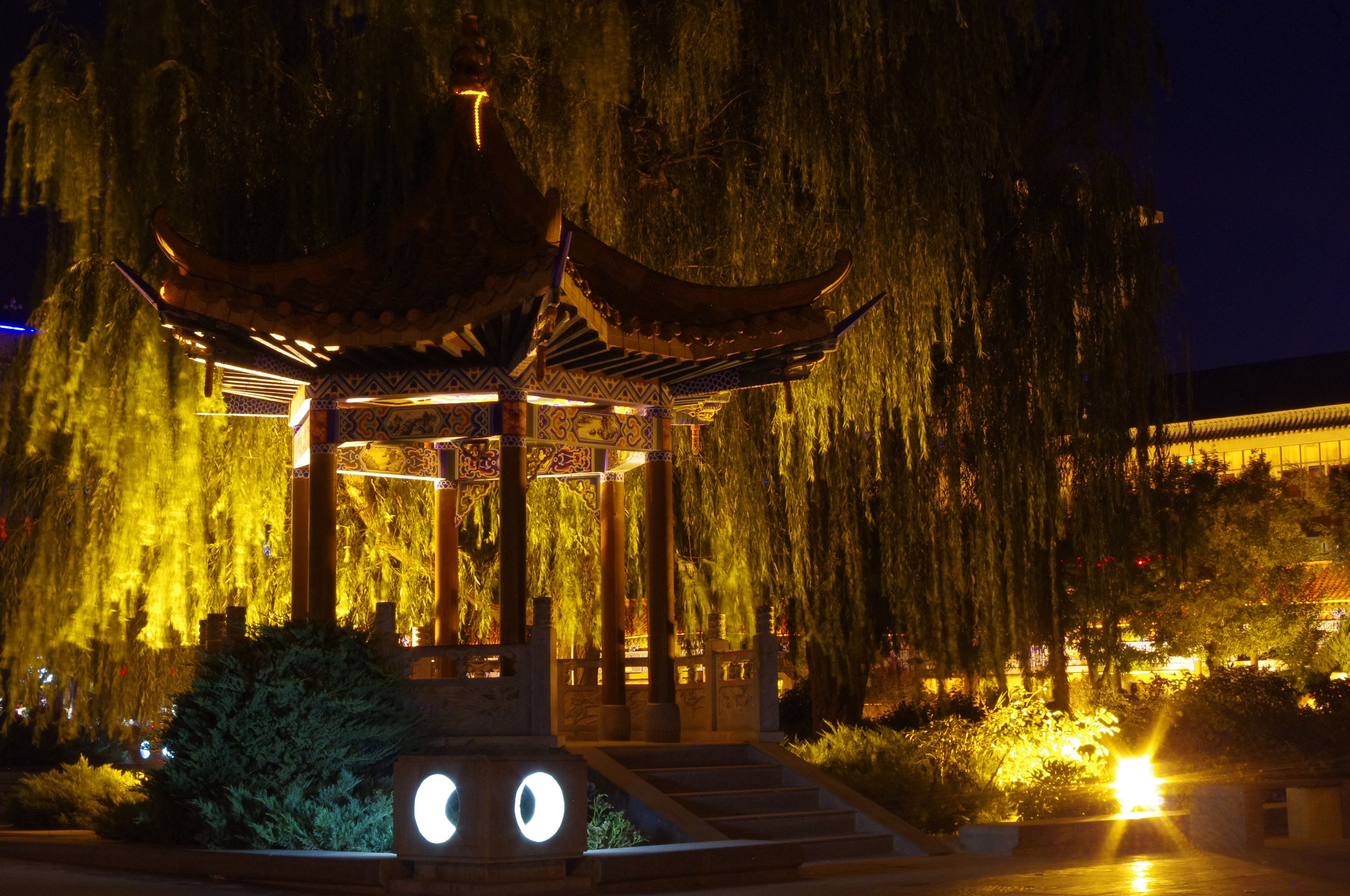 The making of this document was supported by Wikimedia Polska. To zdjęcie zostało wykonane podczas Wikiwyprawy 2015.Wszystkie zdjęcia z wyprawy możesz zobaczyć w kategorii: Wikiwyprawa 2015. English | polski | +/− To zdjęcie zostało załadowane dzięki współpracy z firmą Hyperbook. polski | +/− To zdjęcie zostało załadowane dzięki współpracy z firmą: Kopex Group. English | polski | +/−